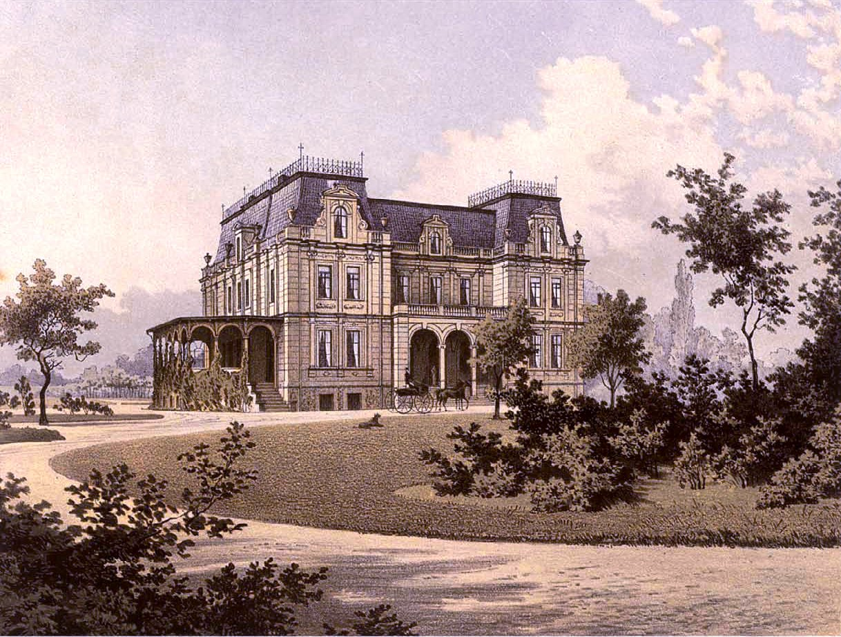 Schloss Niewodnik, Lithographie aus der Sammlung Duncker